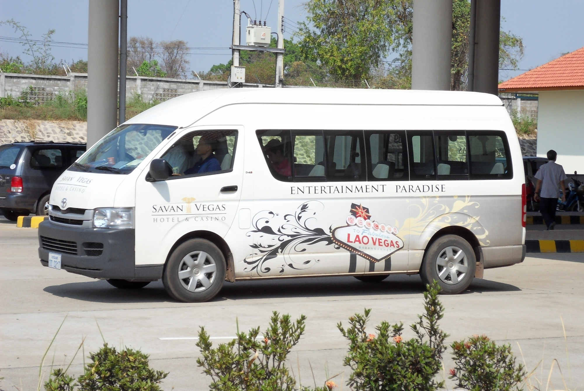 Minibus du casino-hôtel Savan Vegas à l'extrémité du 2ème pont de l'amitié lao-thaïlandaise, fév. 2010.